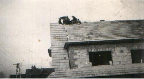 Budowa remizy w Długopolu